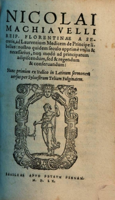 Machiavelli, De principe, 1560 translation, title page